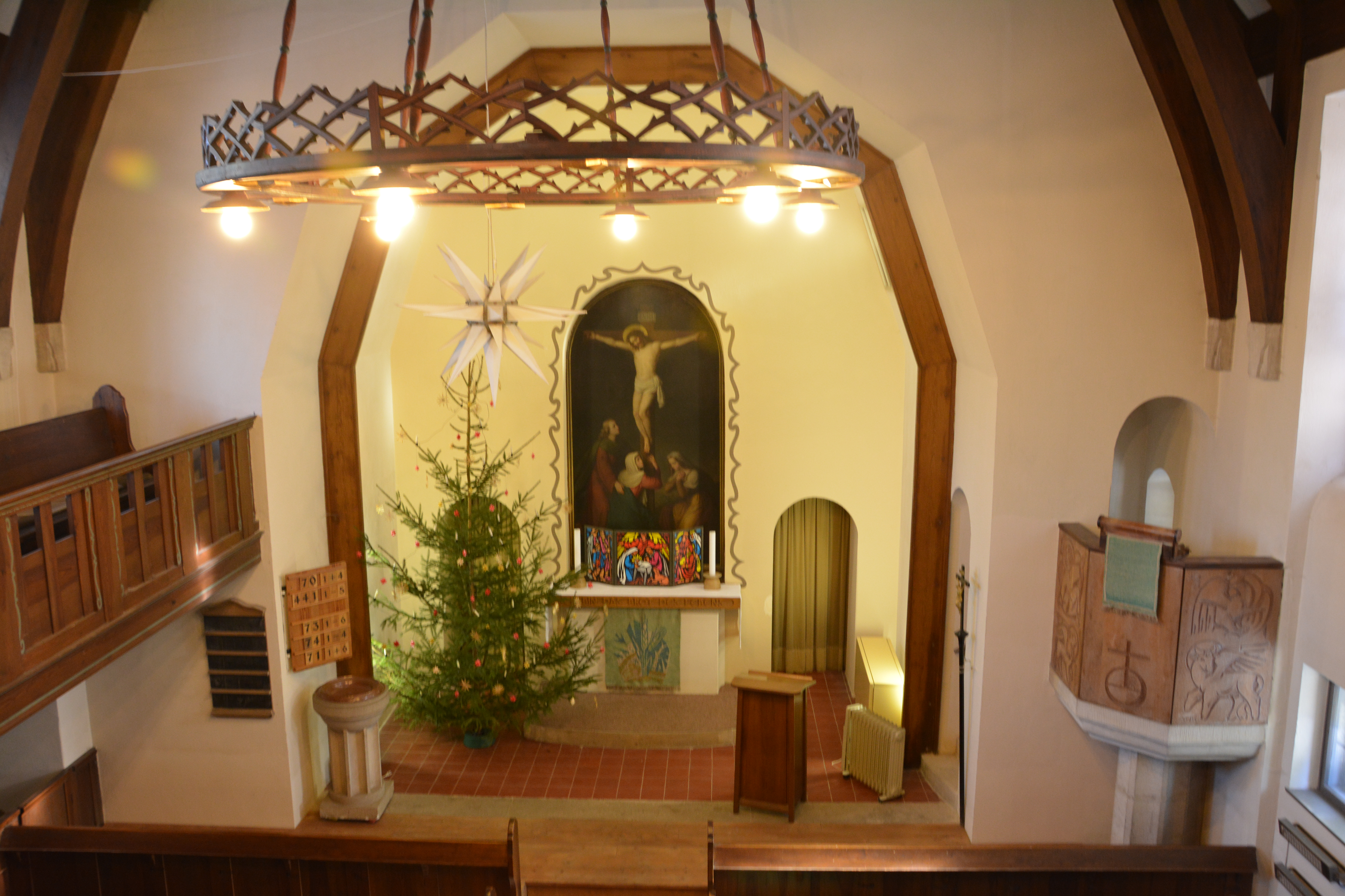 Bergkirche Kurort Kipsdorf, nach einen Entwurf von William Lossow und Max Hans Kühne 1908 erbaut. Kircheninneres